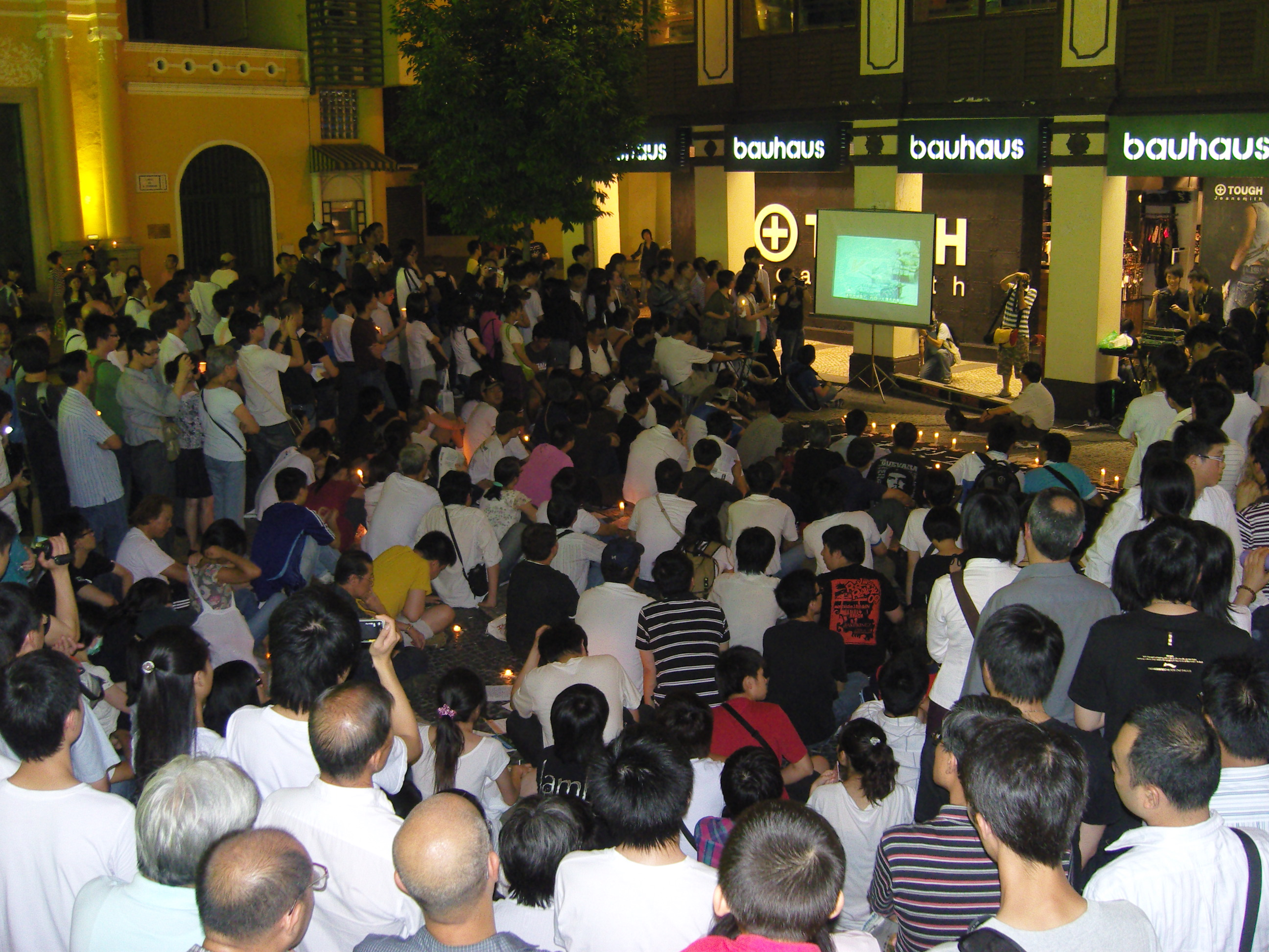 粵語: 六四20週年燭光晚會（澳門）